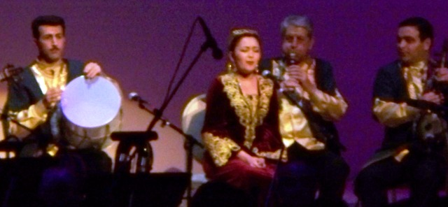 лауреат первой премии фестиваля